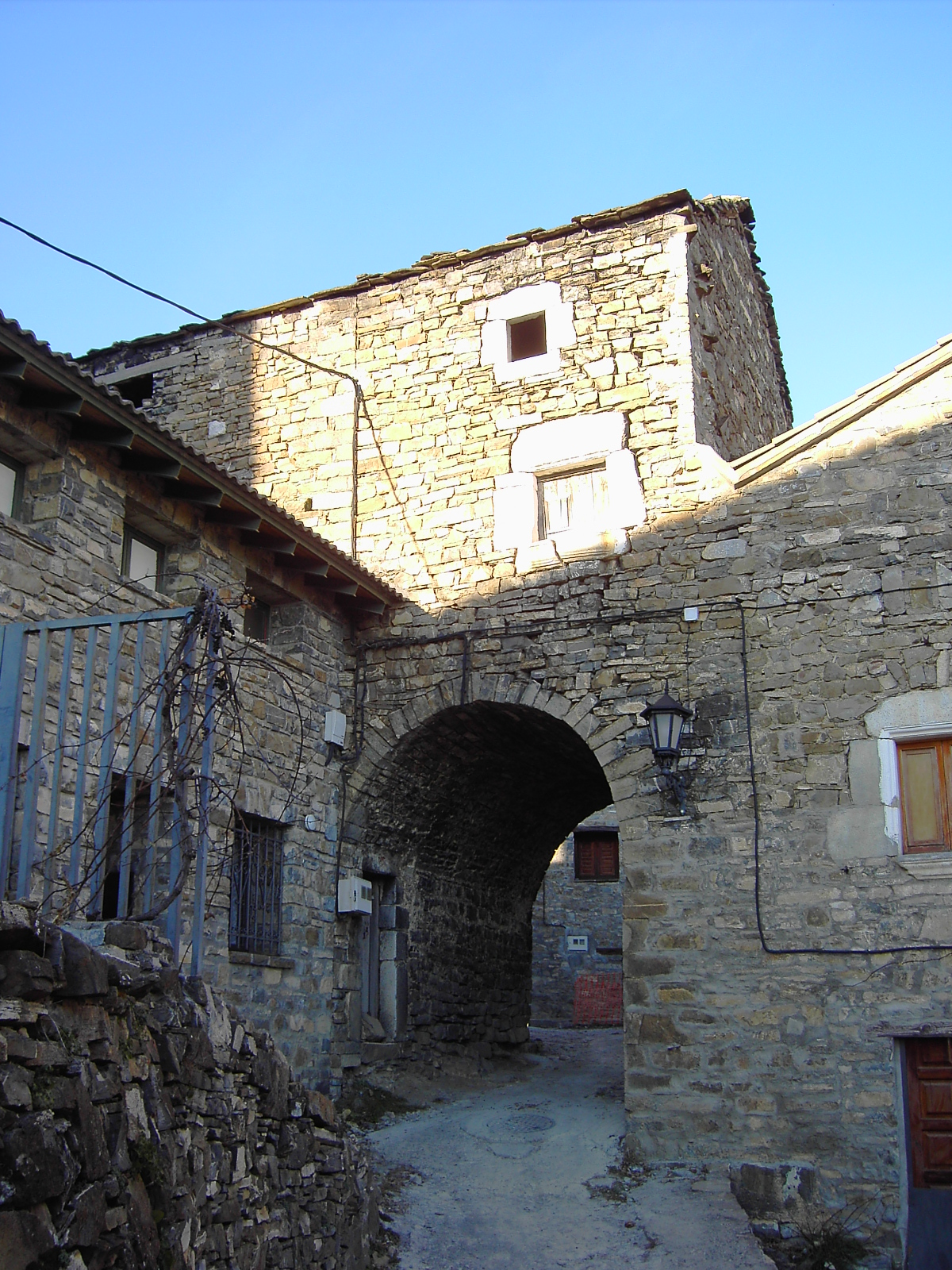 La calle de Bestué que desciende hacia las Faixetas, (Huesca, Spain).